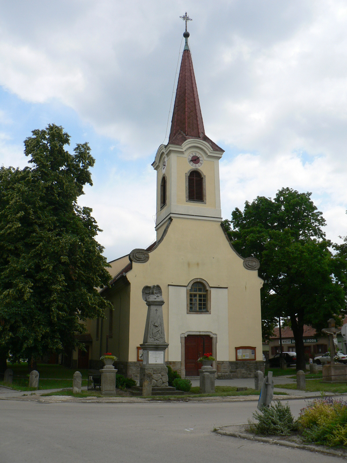 Üröm Szent György vértanú nevére felszentelt katolikus temploma